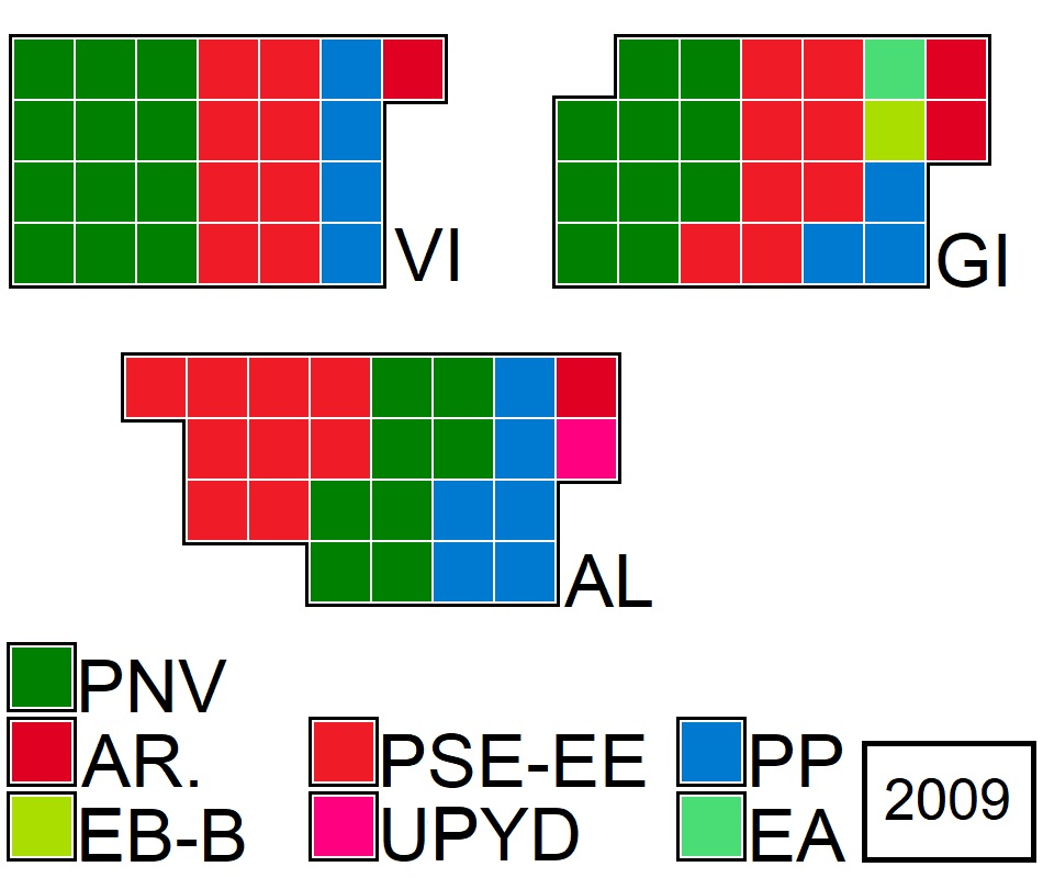 PAÍS VASCO 2009 JPEG